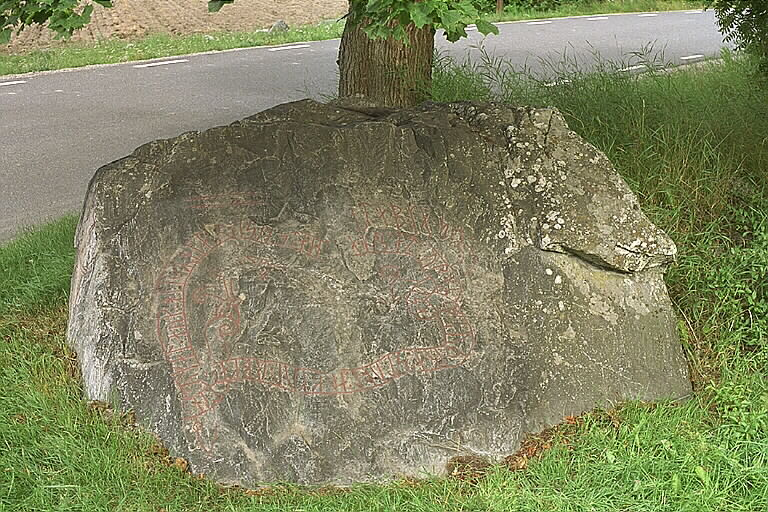 Blocket är ristat på tre sidor. På en sida finns en slinga med runor. Inskriften har inte kunnat tolkas och är förmodligen utförd av en inte oskicklig ristare. På de båda andra sidorna finns ett kors och en mansfigur. Motiv: Sö324 Åsby Nyckelord: Runor Kategori: Runristning/runsten Blocket är ristat på tre sidor. På en sida finns en slinga med runor. Inskriften har inte kunnat tolkas och är förmodligen utförd av en inte oskicklig ristare. På de båda andra sidorna finns ett kors och en mansfigur.